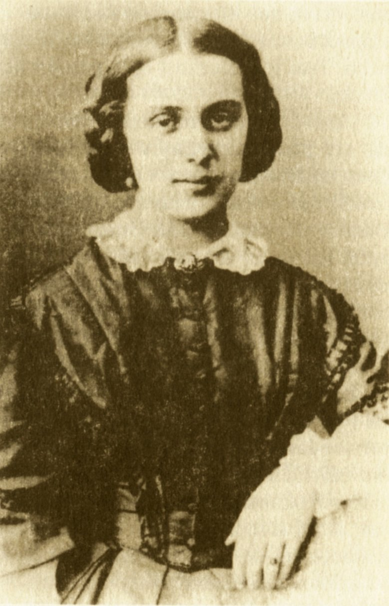 Adèle de Toulouse-Lautrec jako mladá dívka